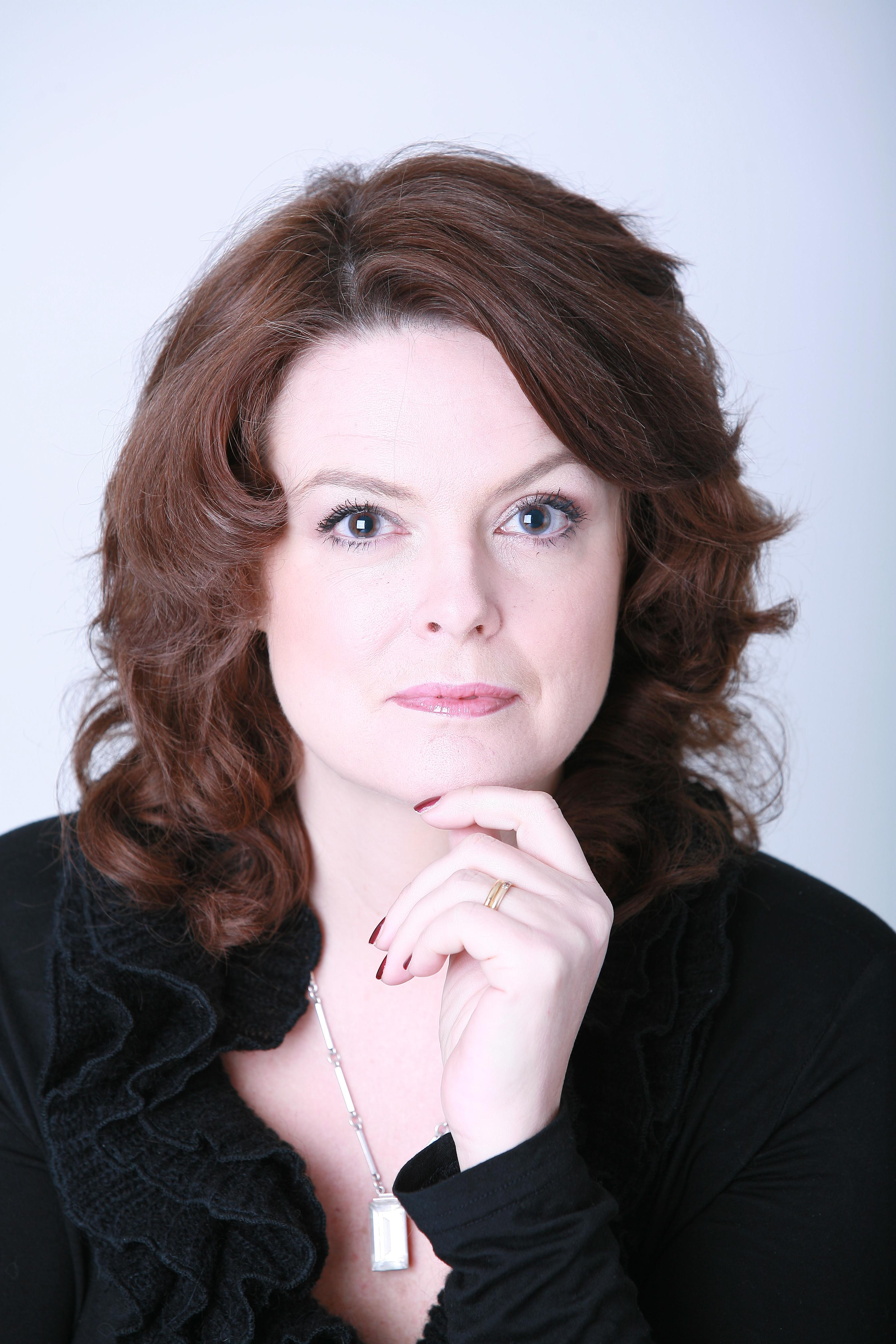 Carina Lundberg markow